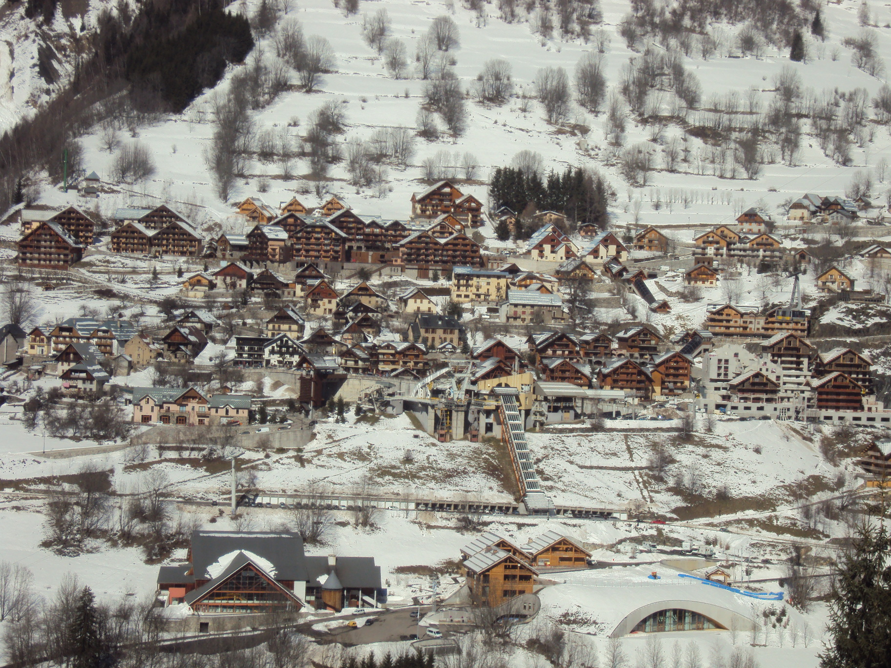 Le village de Vaujany vu depuis le versant opposé.